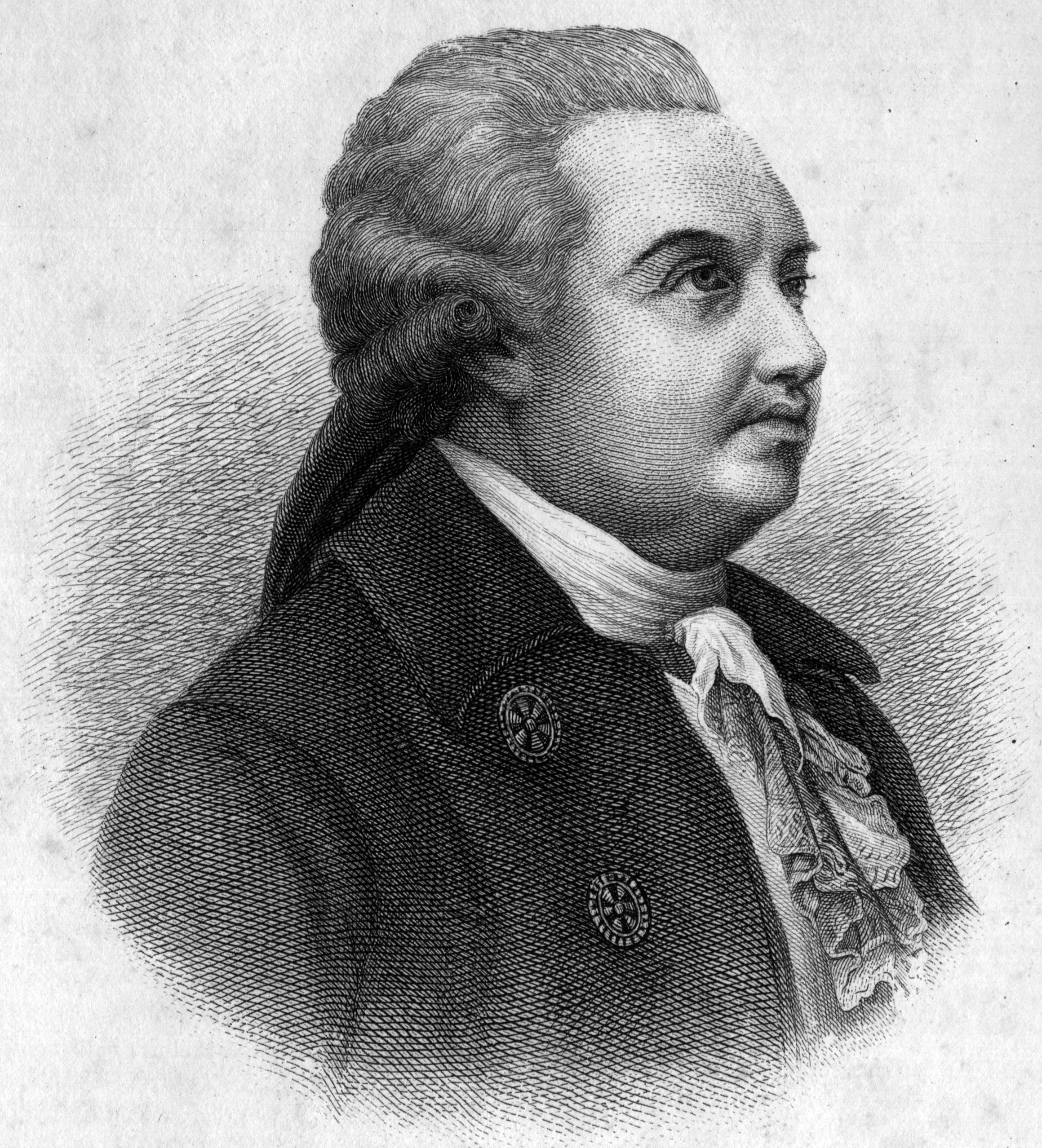 Denis Ivanovich Fonvizin (Russian: Денис Иванович Фонвизин), only engraving